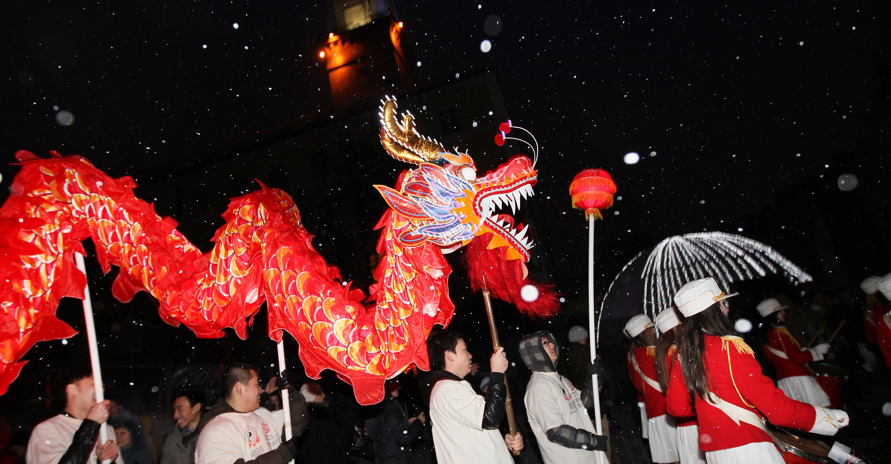 "Живі" дракони мандрували центральними вулицями Львова проганаючи усі клопоти та негаразди з міста